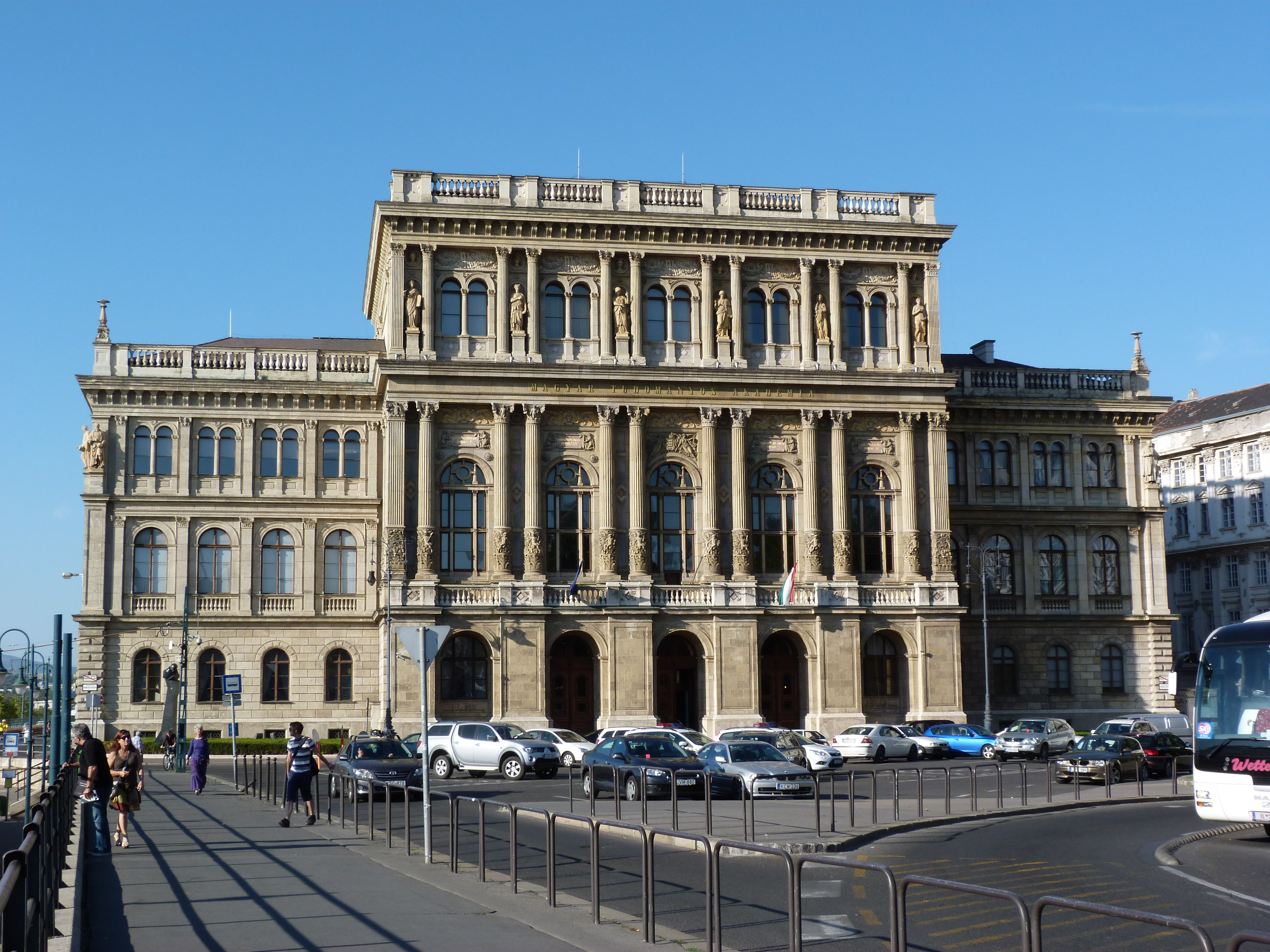 A Magyar Tudományos Akadémia 2011. szeptember 30 -án.